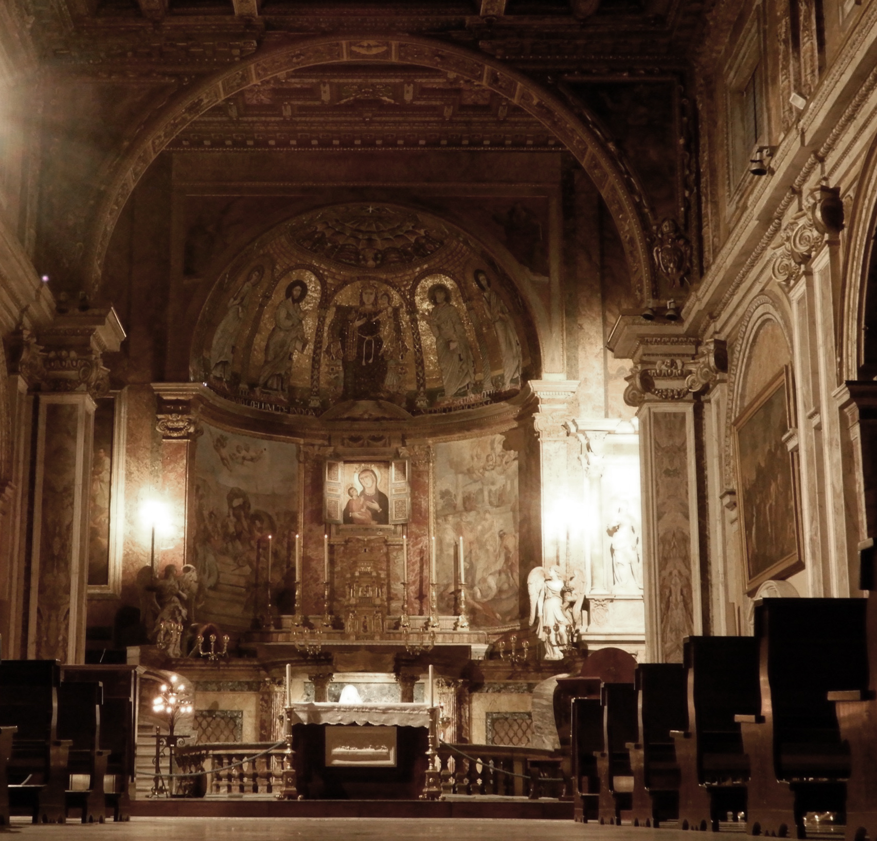 Roma, chiesa di Santa Francesca Romana, interno